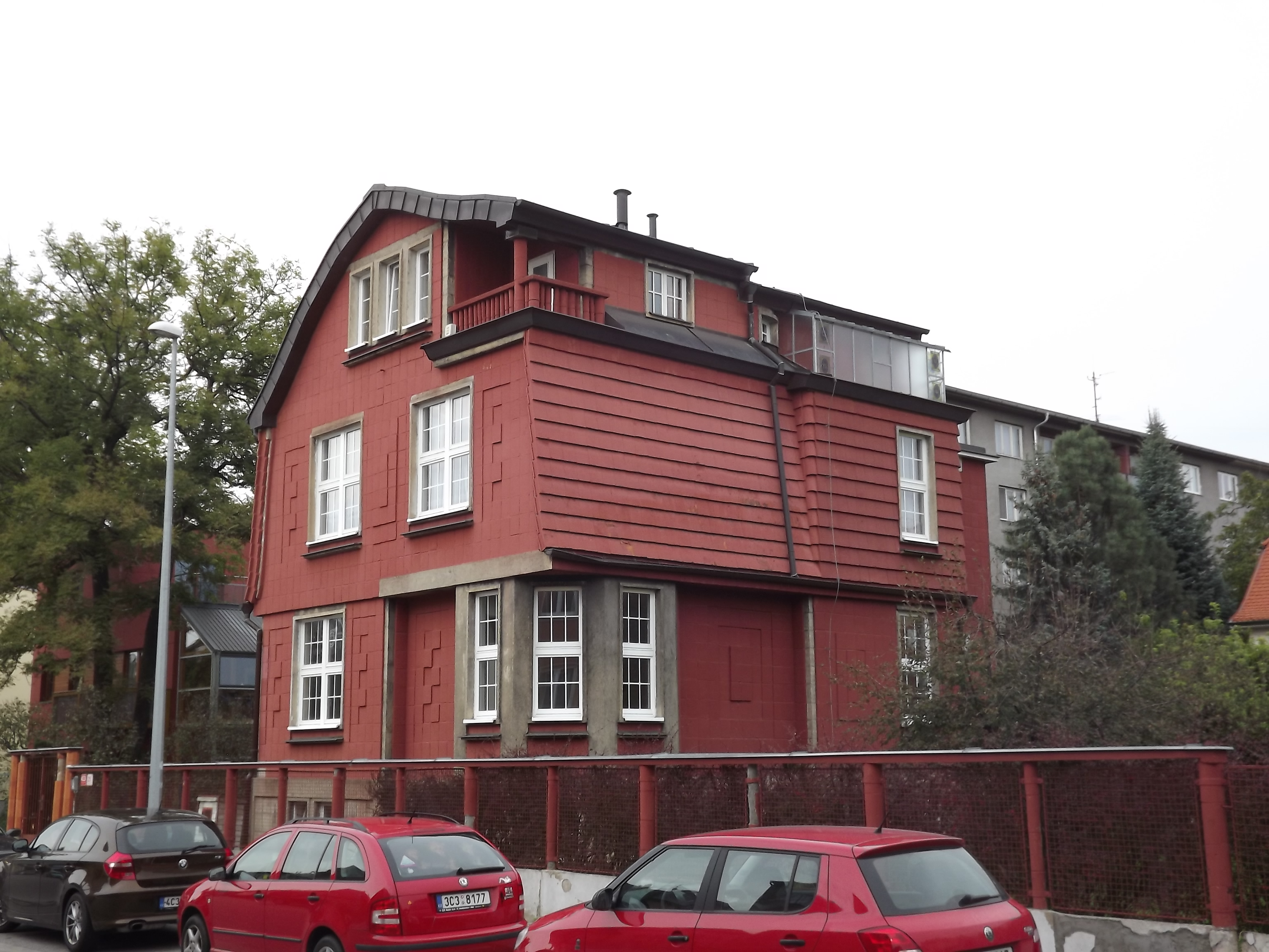 vila Františka Petráše, Dukelská 453/25, České Budějovice